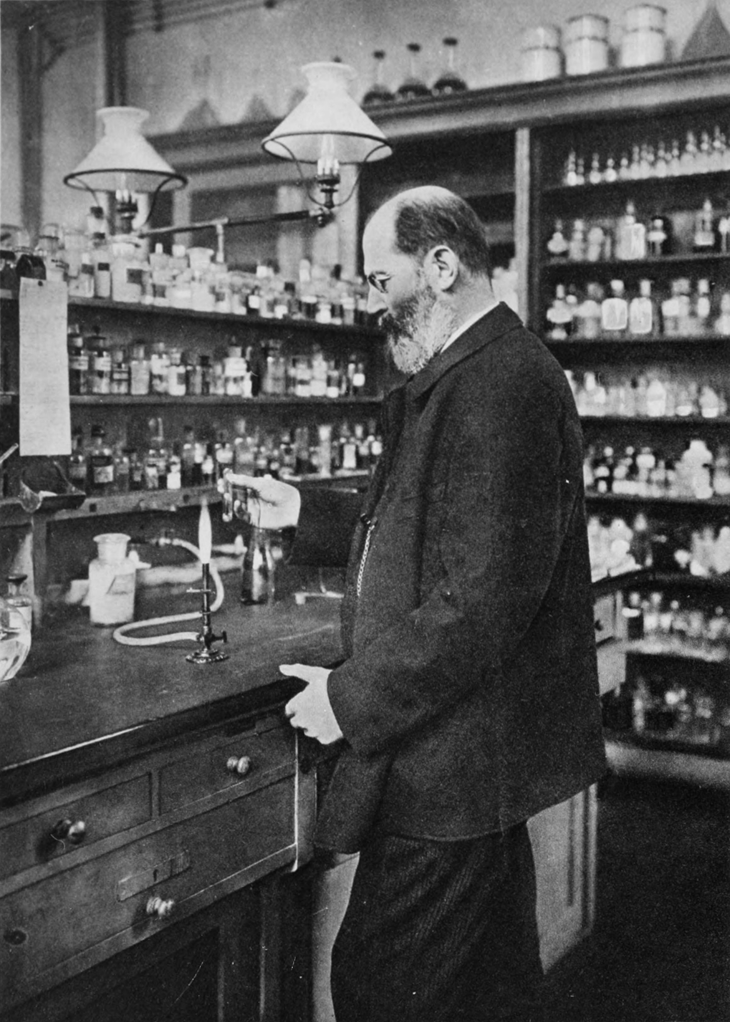 Hermann Emil Fischer (* 9. Oktober 1852 in Euskirchen; † 15. Juli 1919 in Berlin), im neuen Berliner Privatlabor in der Hessische Str. 1-2 (nach Juli 1900)